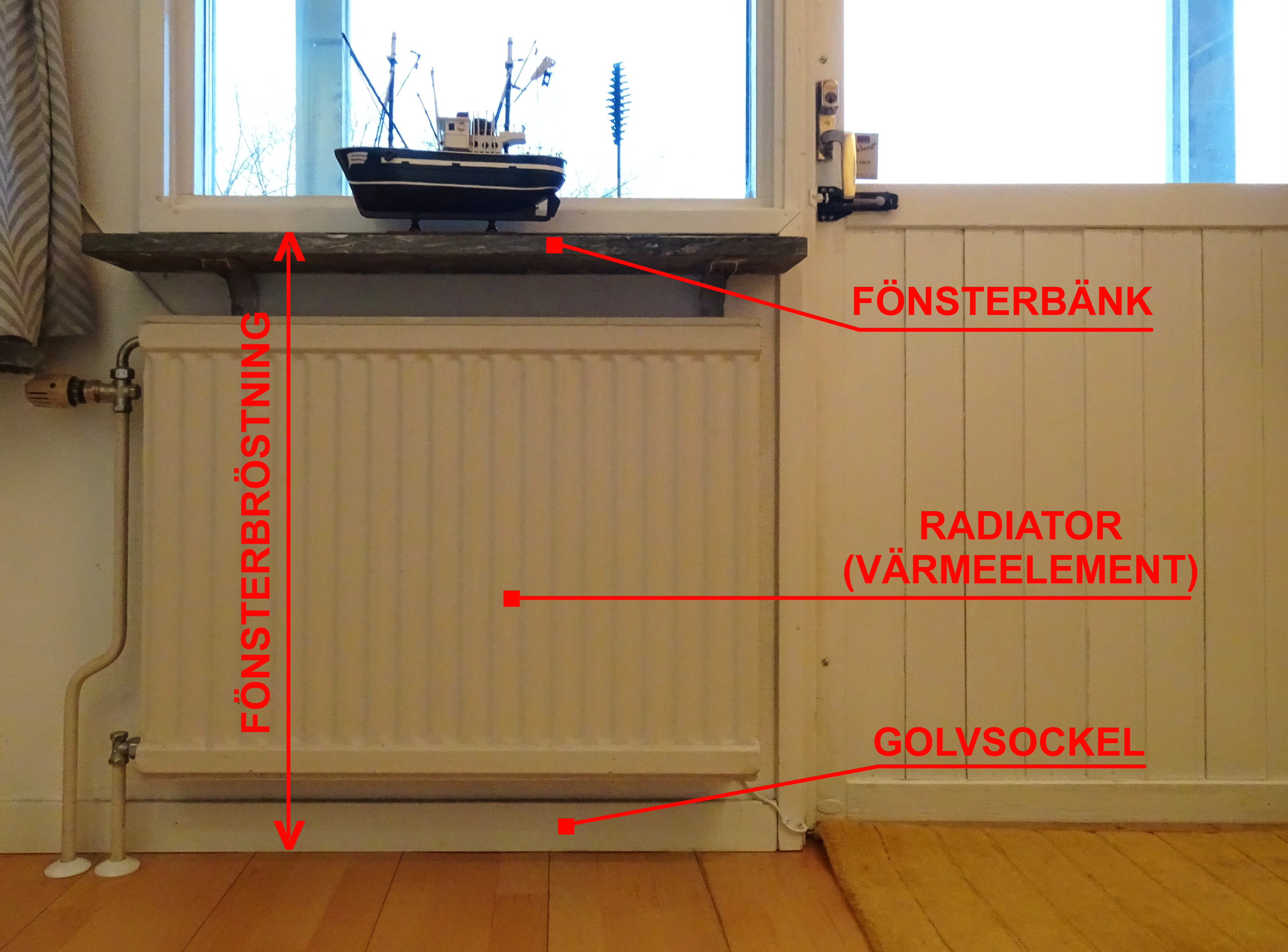 Fönsterbröstning, fönsterbänk, radiator och golvsockel